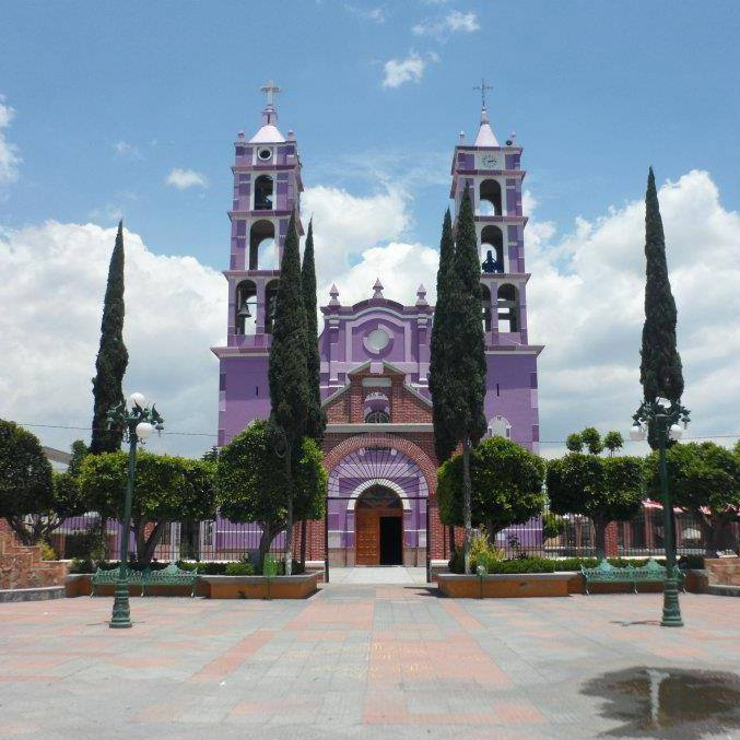 La Parroquia Jesús de las Maravillas es sede de diversos acontecimientos religiosos, y uno de los edificios más representativos de la ciudad, no sólo por sus torres, sino porque tiene una gran historia. Fotografía Jeshua Geraldi © D.R.